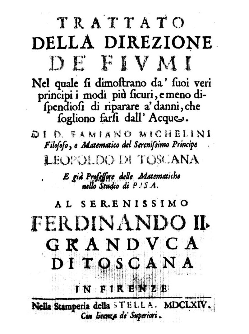 Frontespizio